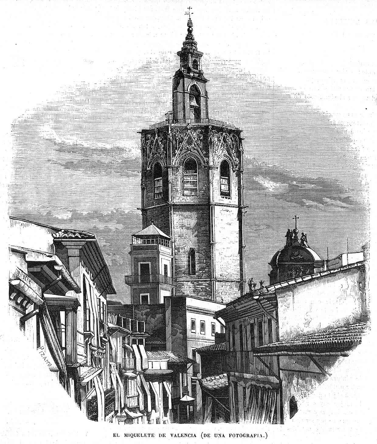 El Miquelete de Valencia, en la revista española El Museo Universal.